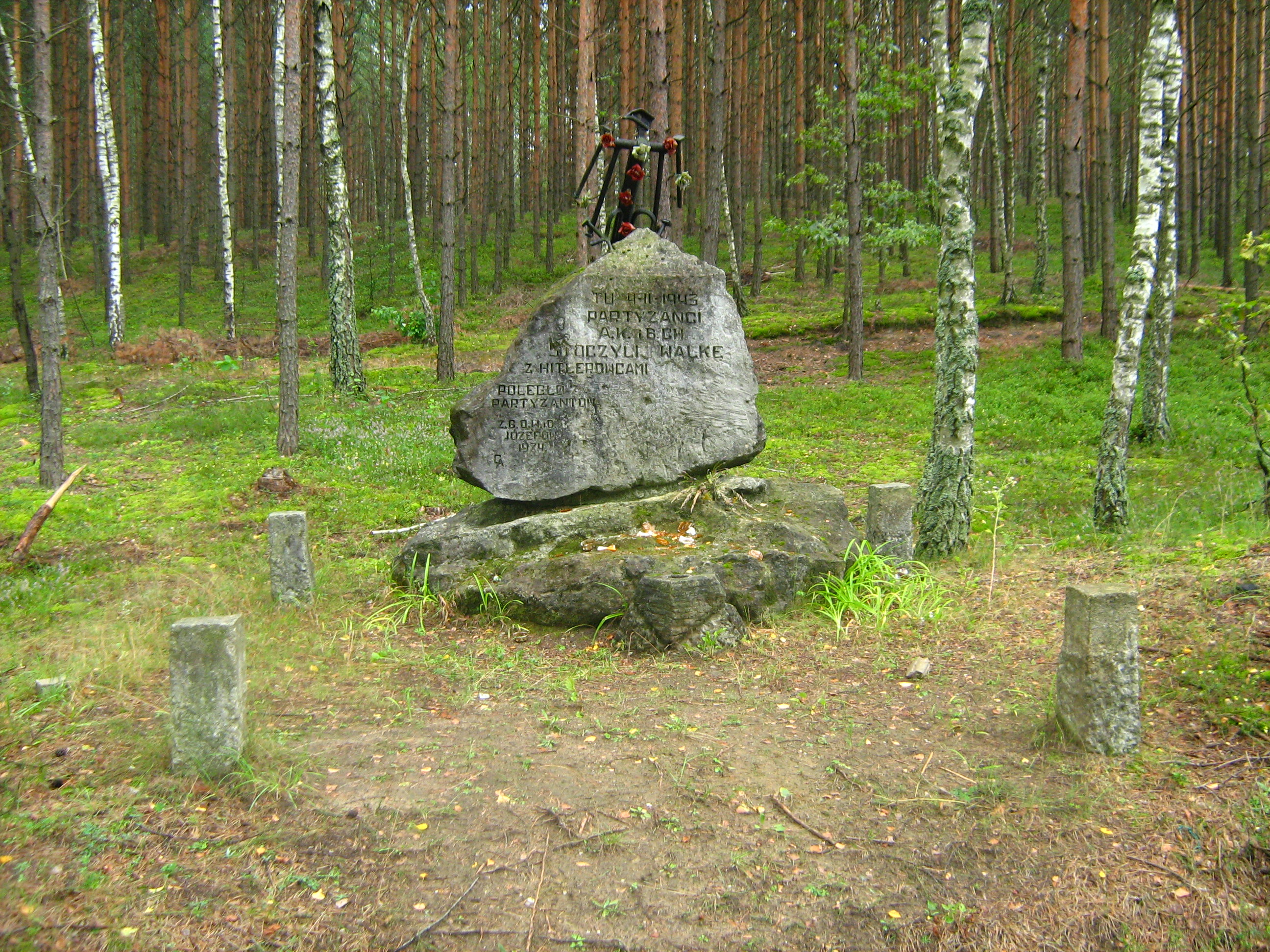 Obelisk w miejscu partyzanckiej potyczki z 1943 r. przy drodze Długi Kąt-Hamernia (pow. biłgorajski)